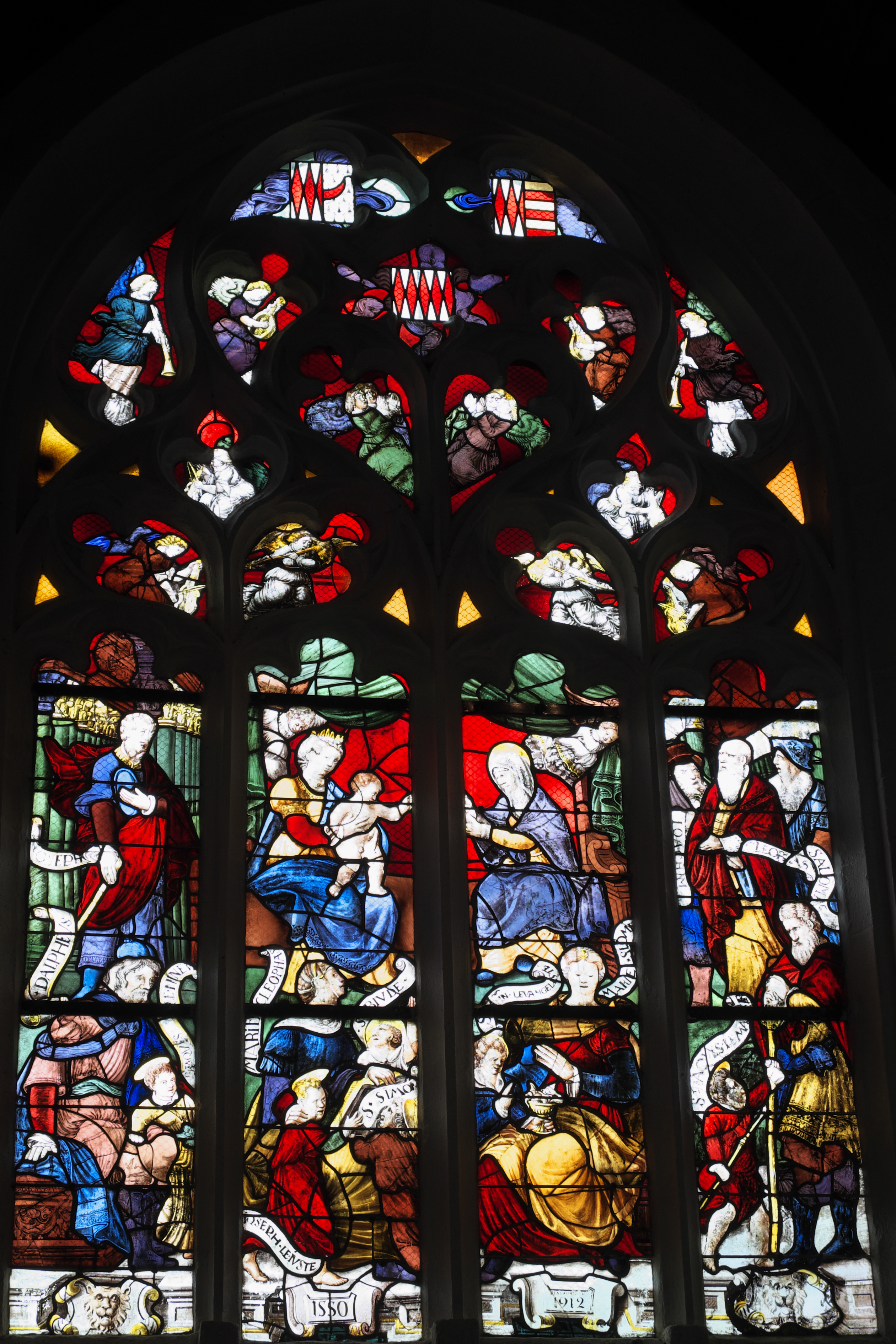 Kapelle Saint-Fiacre in Le Faouët im Département Morbihan (Region Bretagne/Frankreich), Bleiglasfenster von 1550, 1912 restauriert; Darstellung: Heilige Sippe